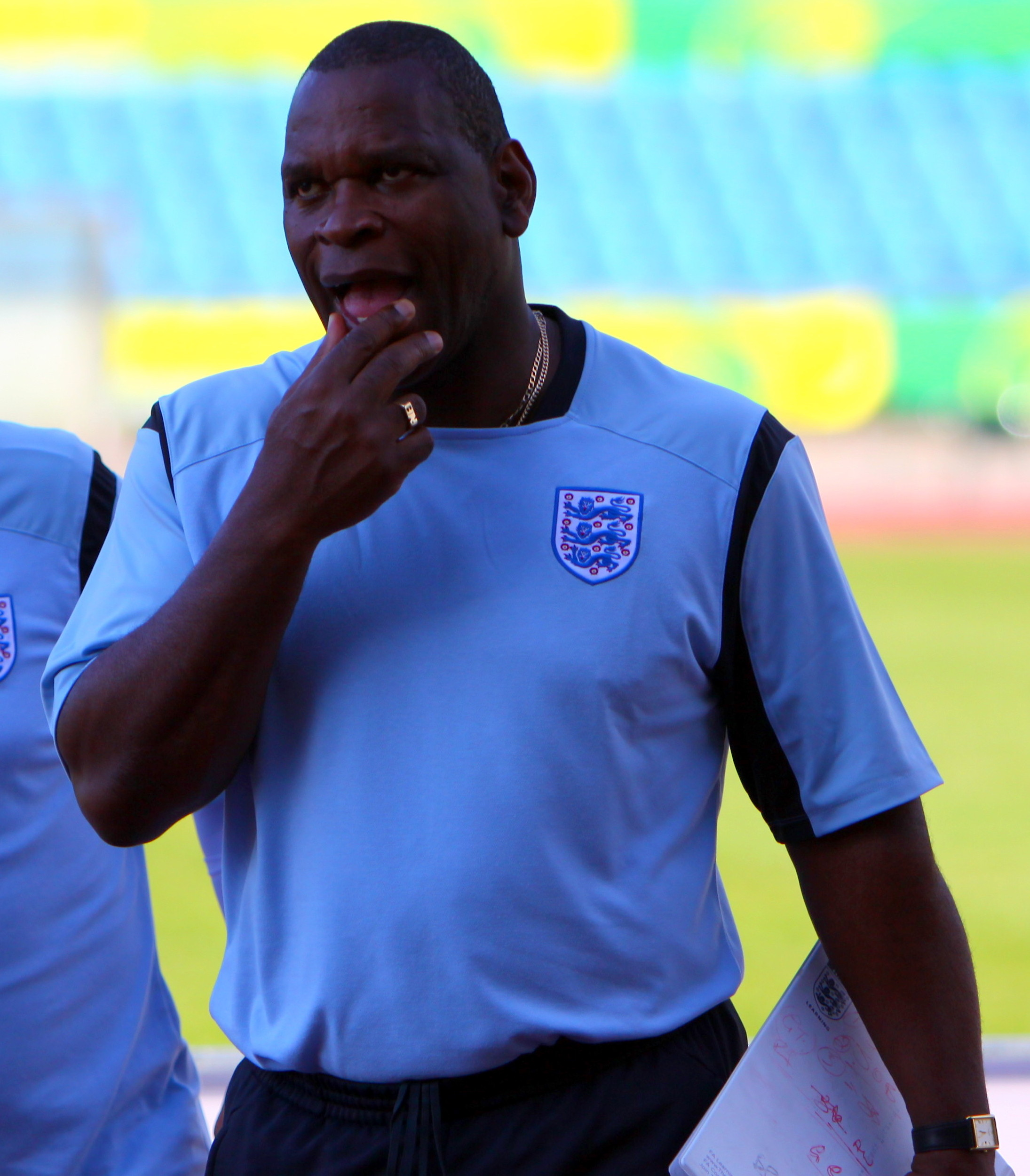 Noel Blake